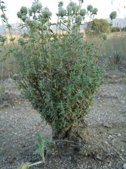 Thymus mastichina. Tomillo, Mejorana, Provincia de Ávila, España